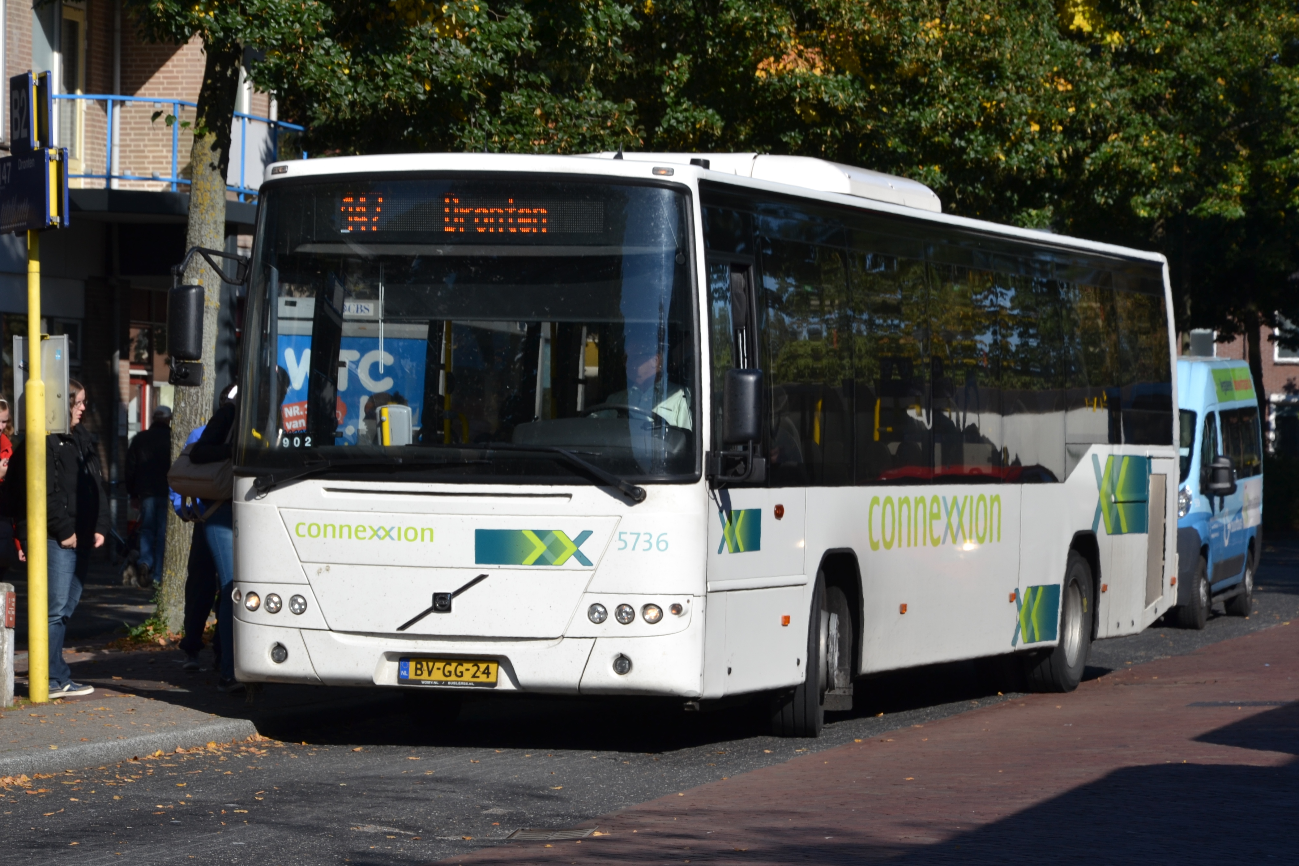 Connexxion 5736, een Volvo 8700, als lijn 147 naar Dronten, op het busstation van station Harderwijk.